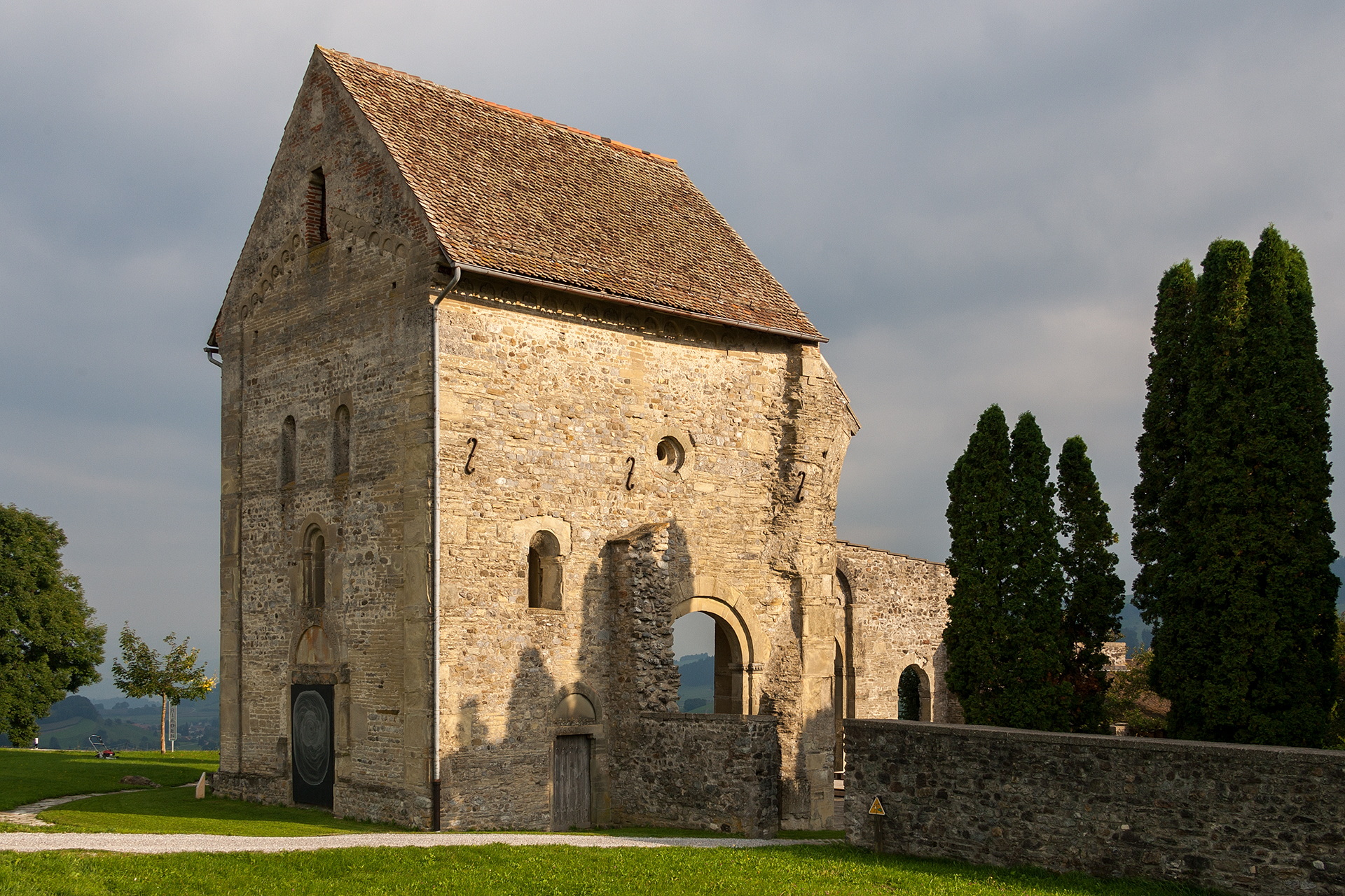 Klosterruine Rüeggisberg (BE)